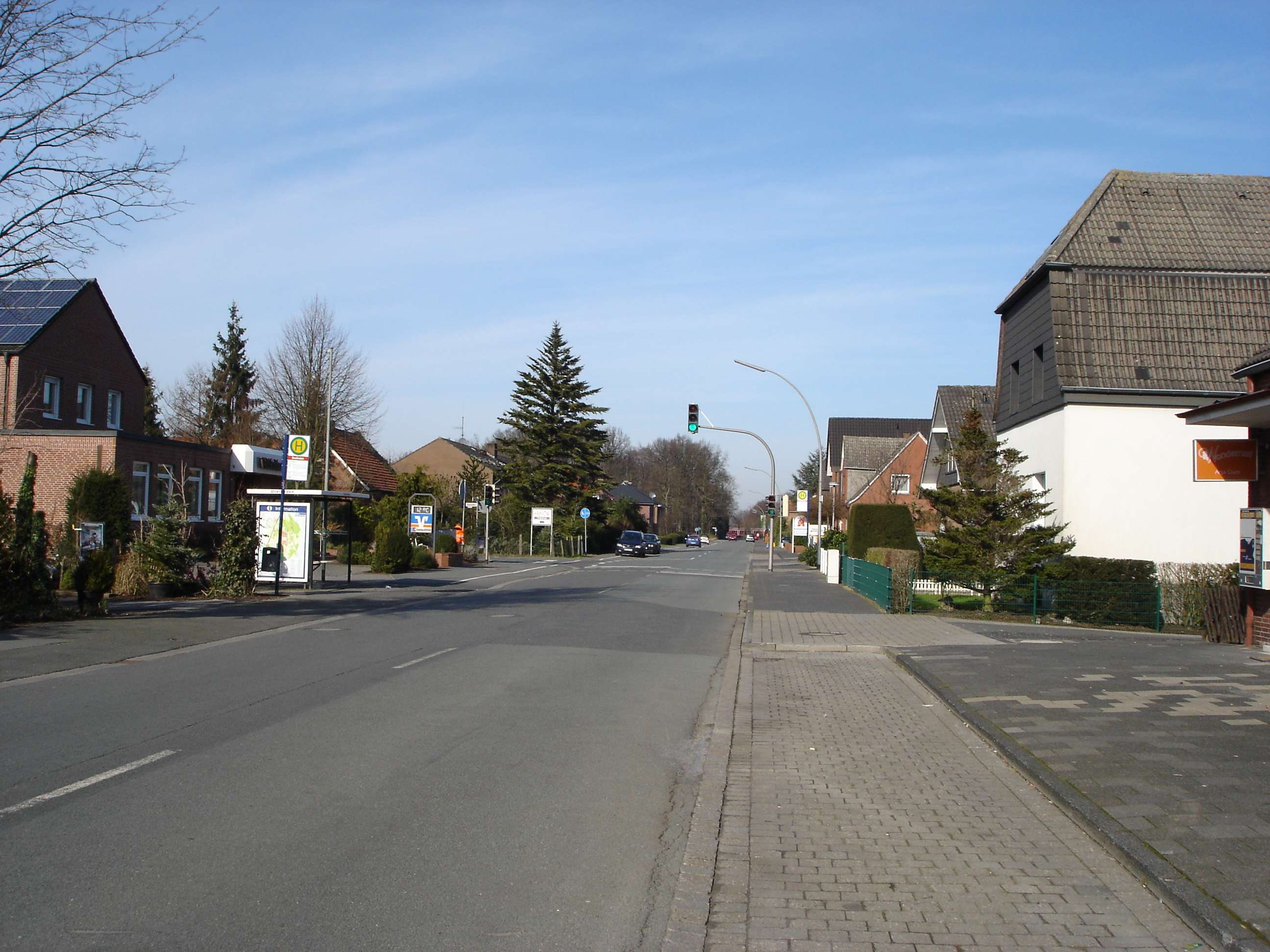 Sprakeler Straße in Münster-Sprakel, Germany